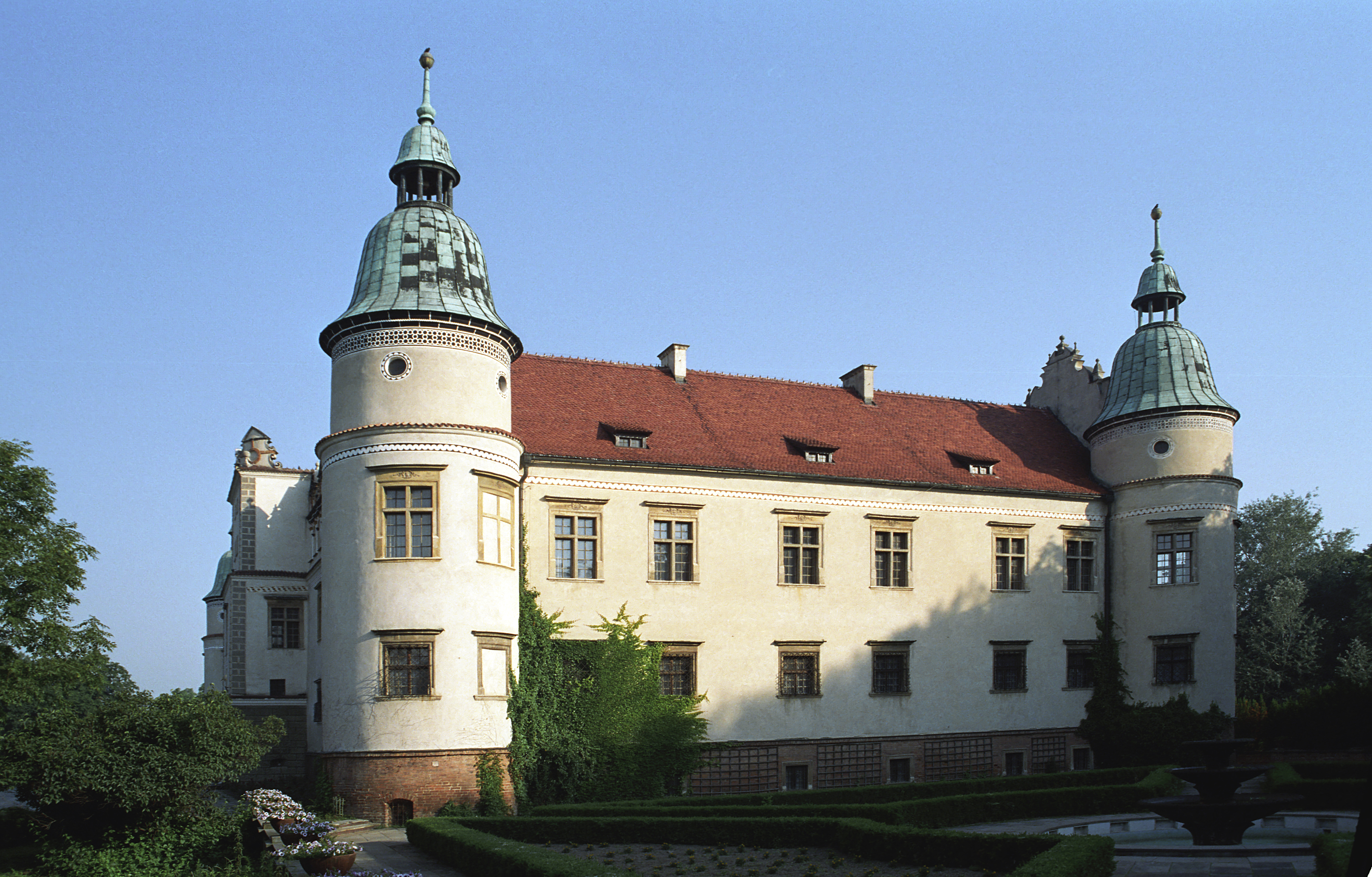 Baranów Sandomierski Castle